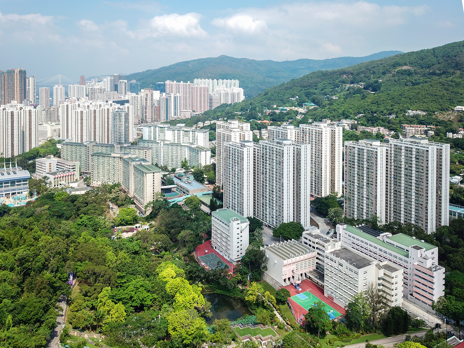 Shek Wai Kok Estate